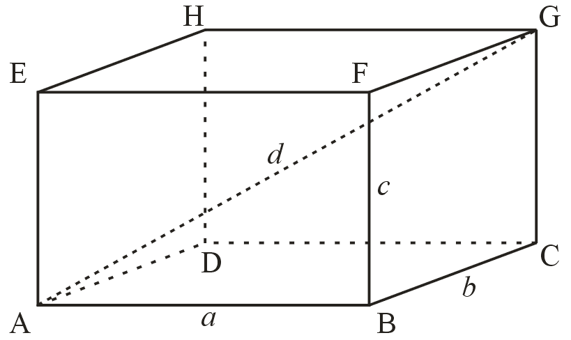 Author: Michael Angelkovich